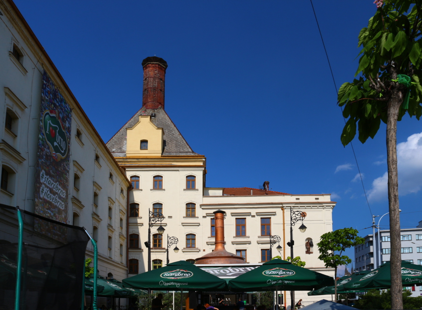 Pivovar Starobrno